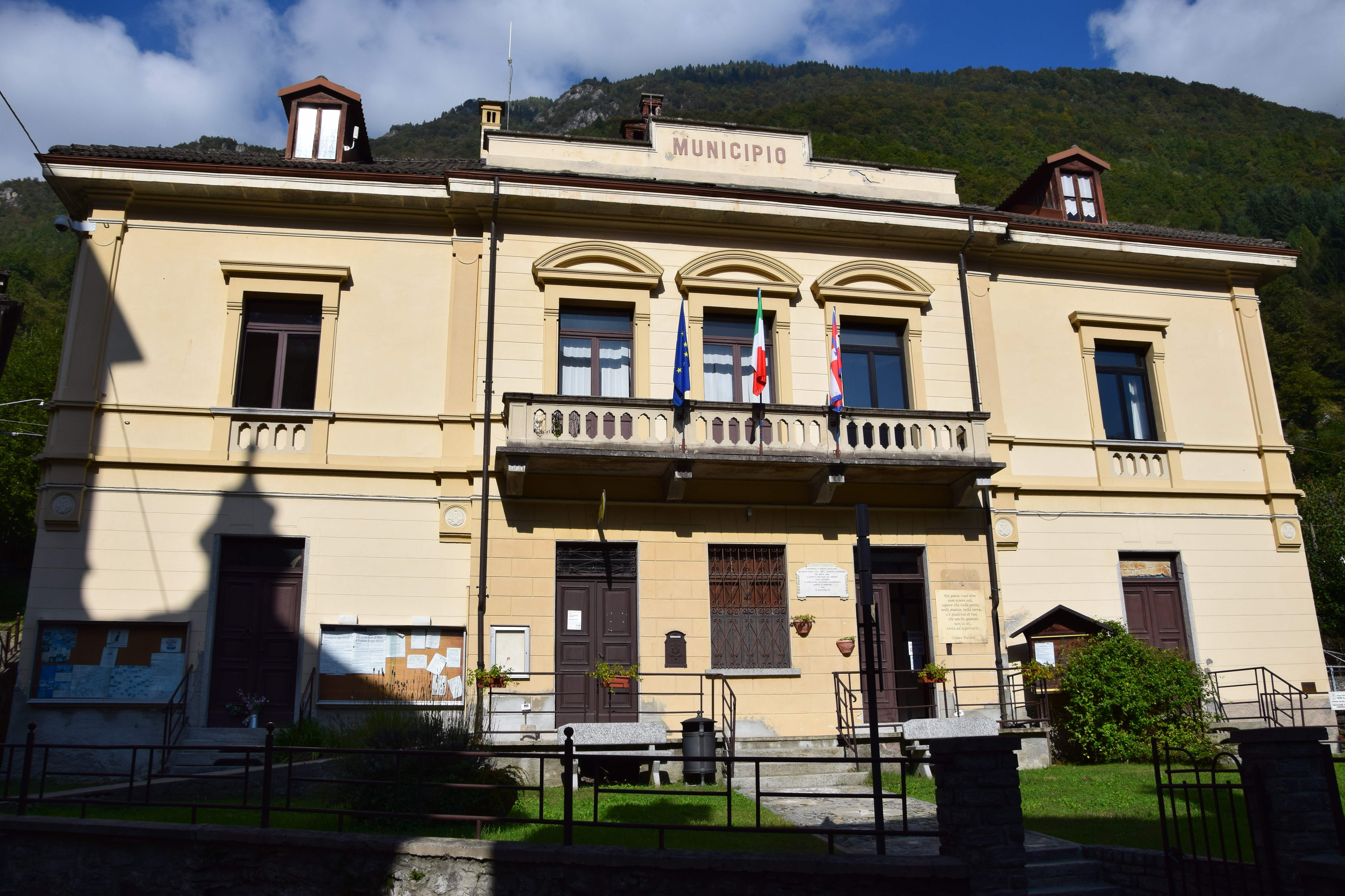 Palazzo Comunale This is a photo of a monument which is part of cultural heritage of Italy.